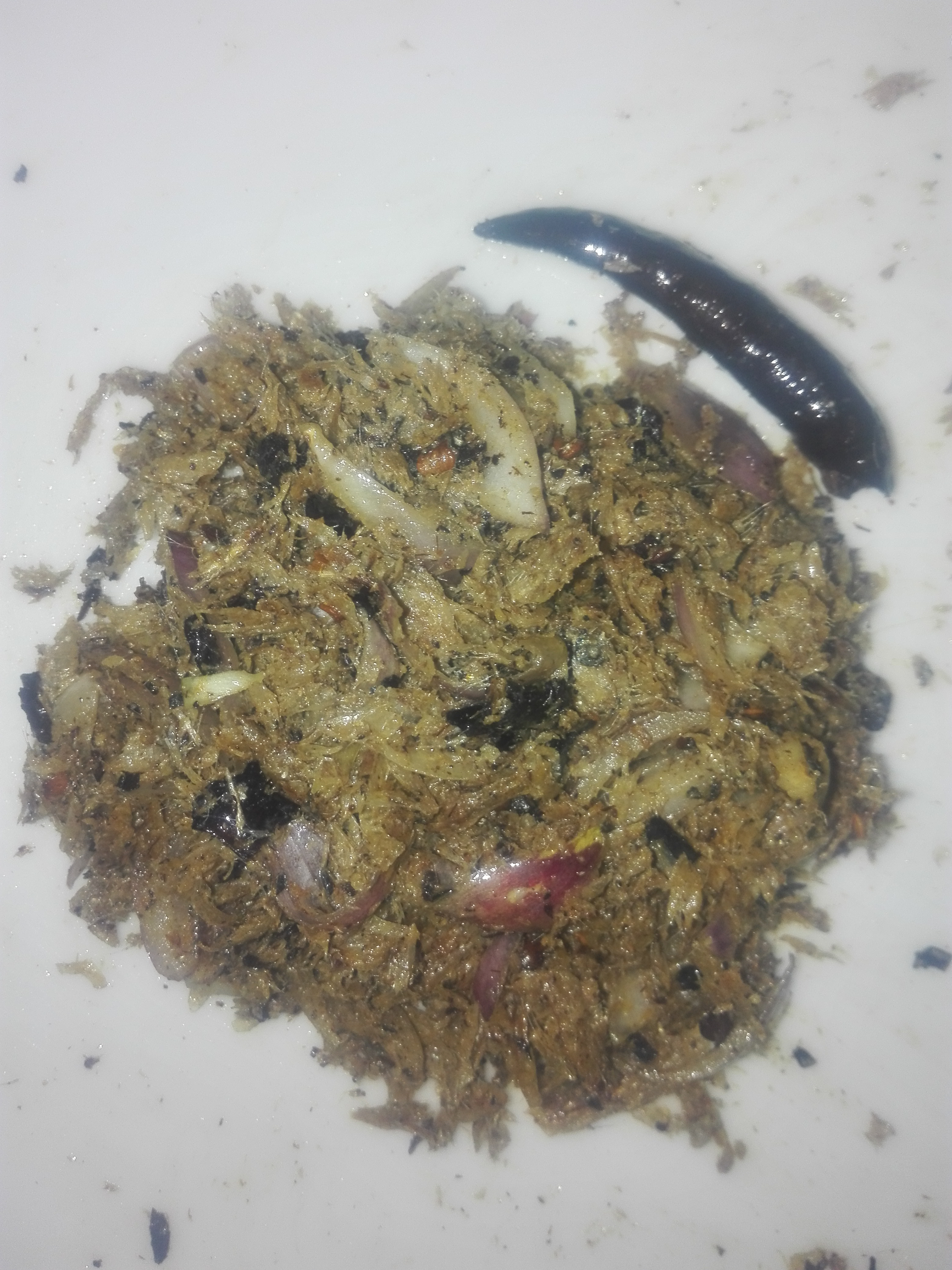 shutki vorta